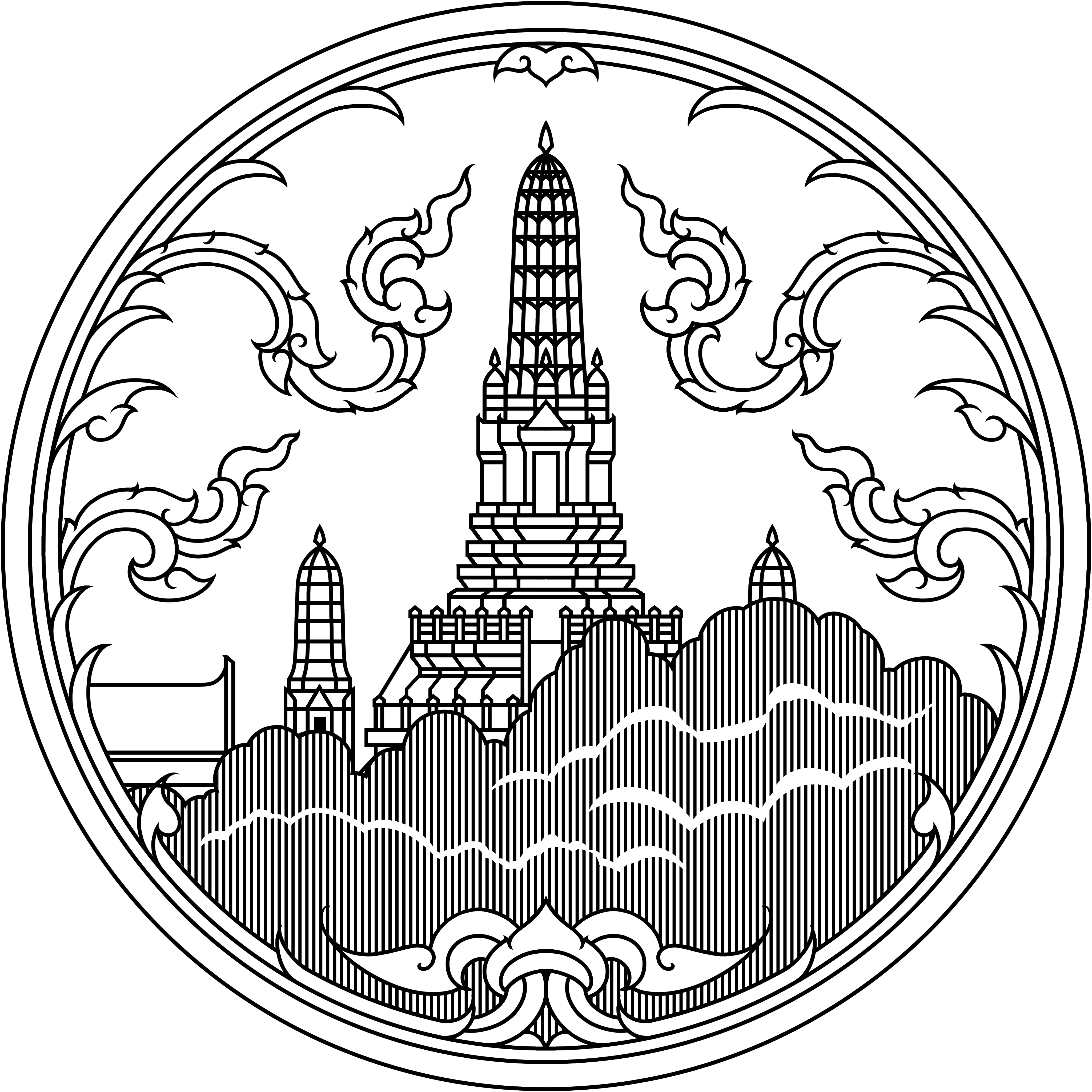 ตราประจำจังหวัดธนบุรี (พ.ศ. 2484 - 2514) ภาพจากหนังสือตราประจำจังหวัด กรมศิลปากรจัดพิมพ์ พ.ศ. 2542